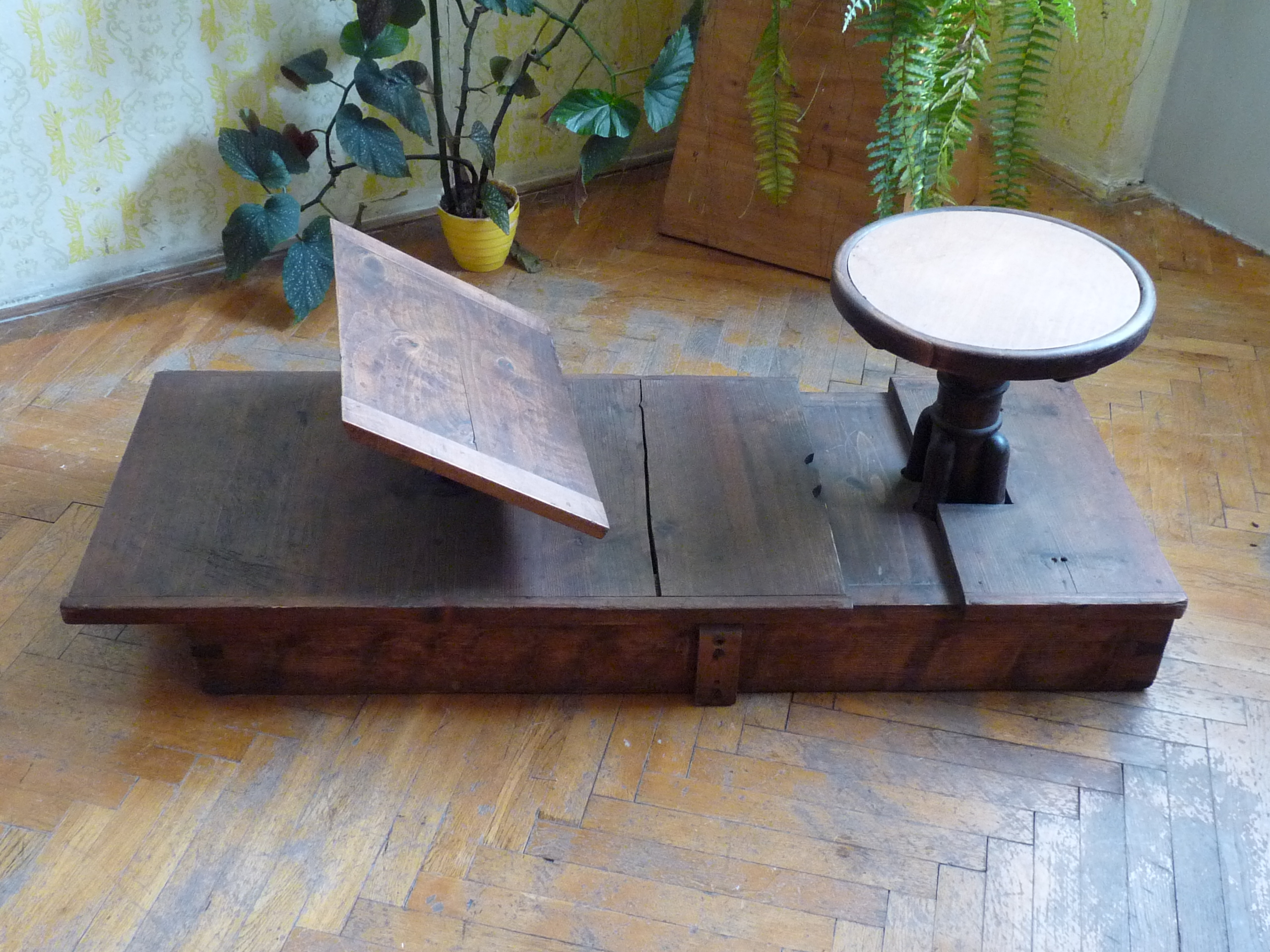 Školní lavice bezrukého Frantíka, uložená na OÚ v Jamném nad Orlicí.